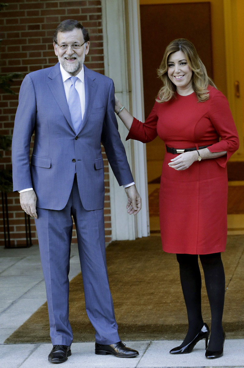 1419272614768diazrajoyampli